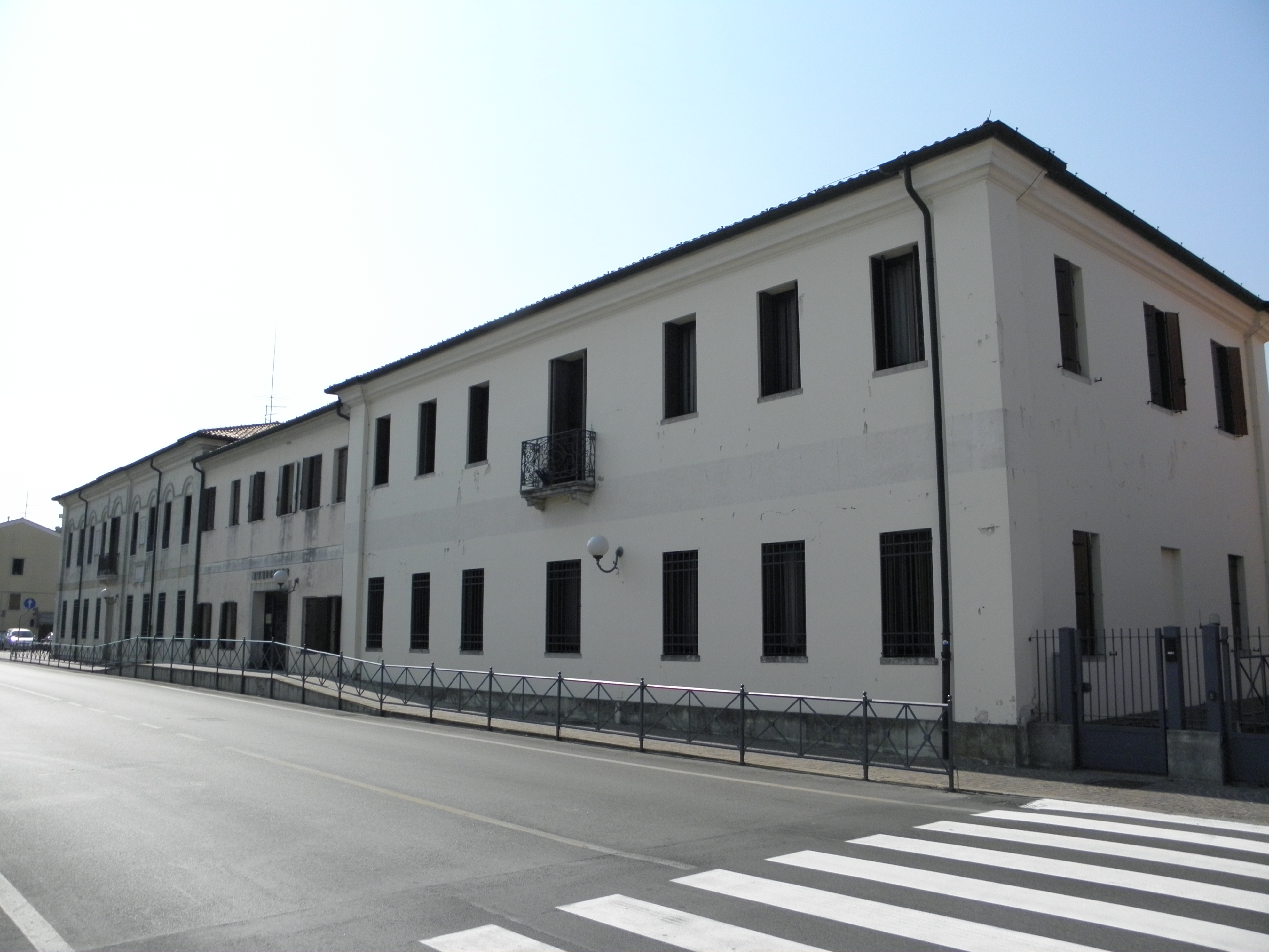 Brugine: la palazzina sede del municipio.